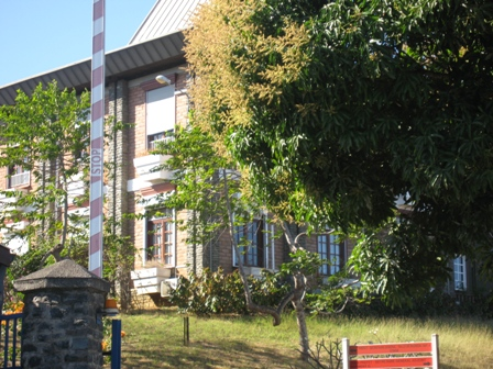 Photographie Prefecture de Mayotte